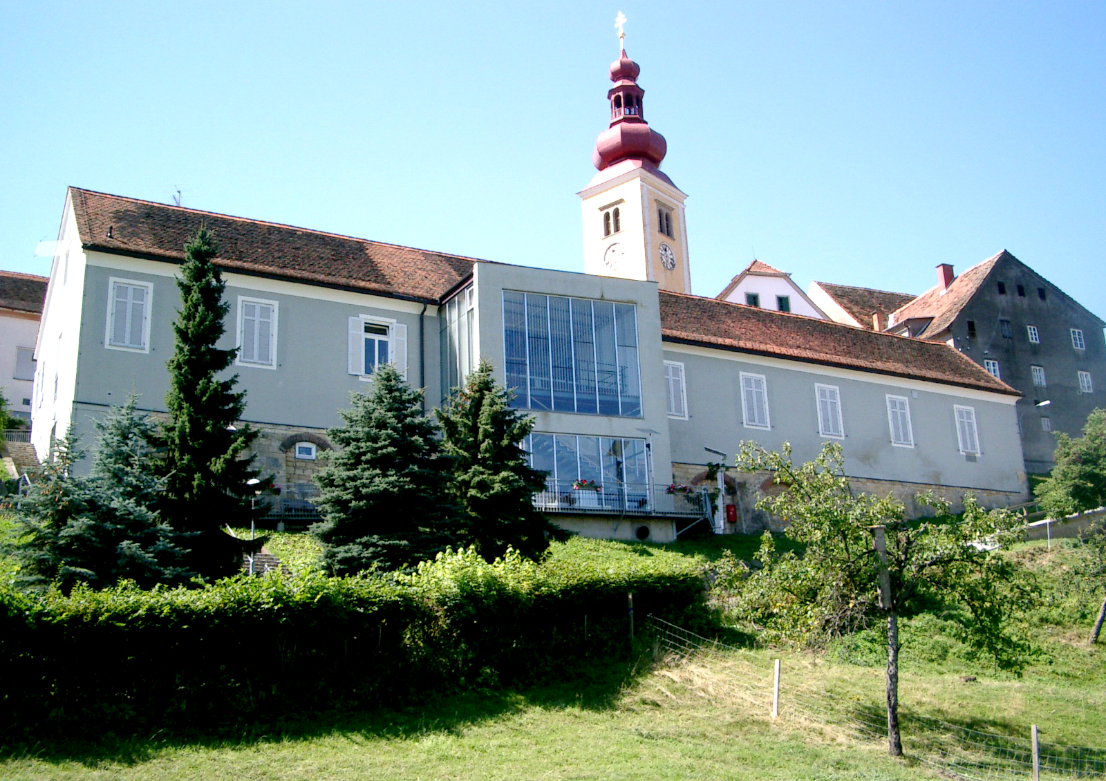 Kulturhaus (ehem. Klosterschule), Straden, Steiermark.